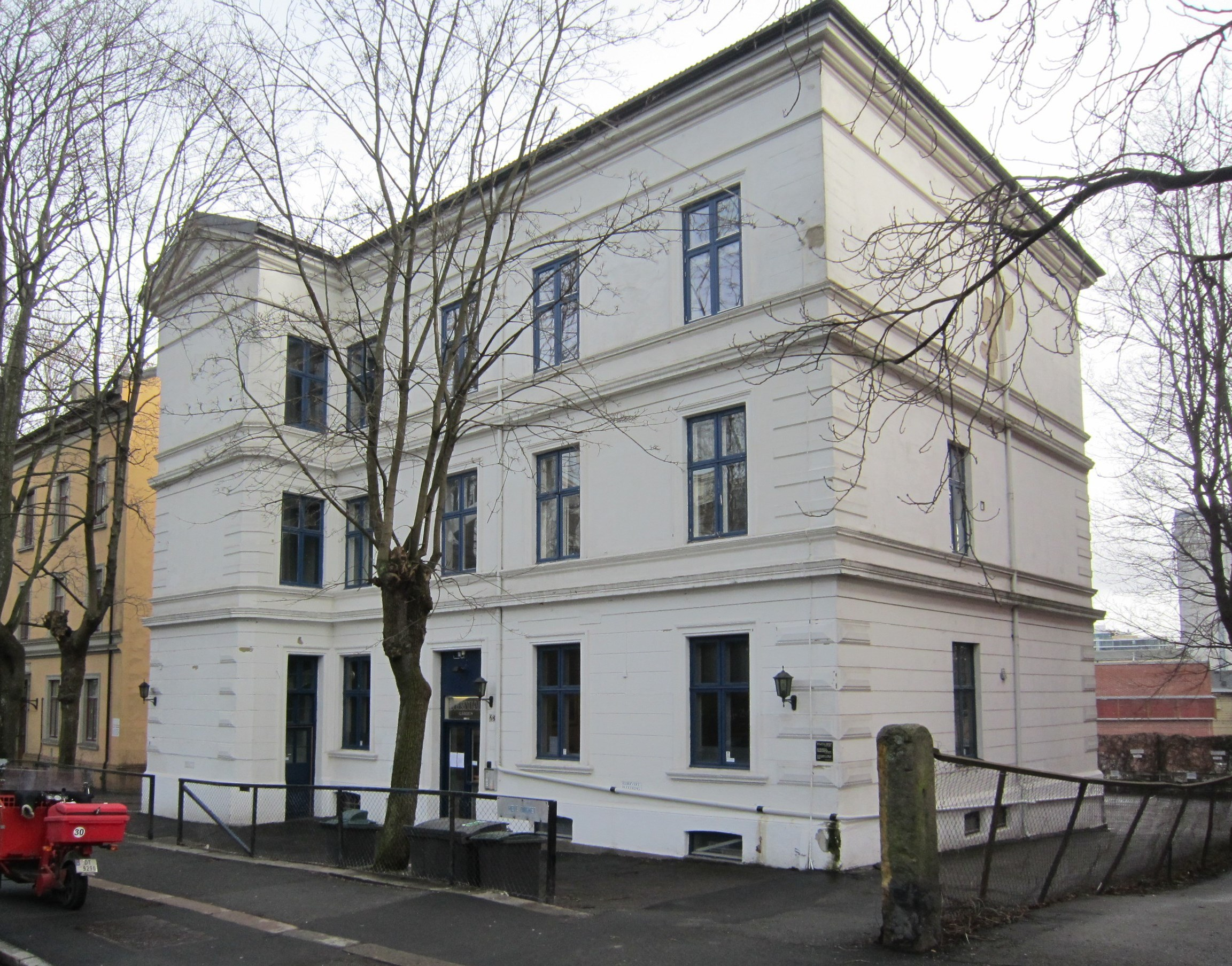 Berstadgården, Munkedamsveien 68 (arkitekt: Anselm Liljeström)